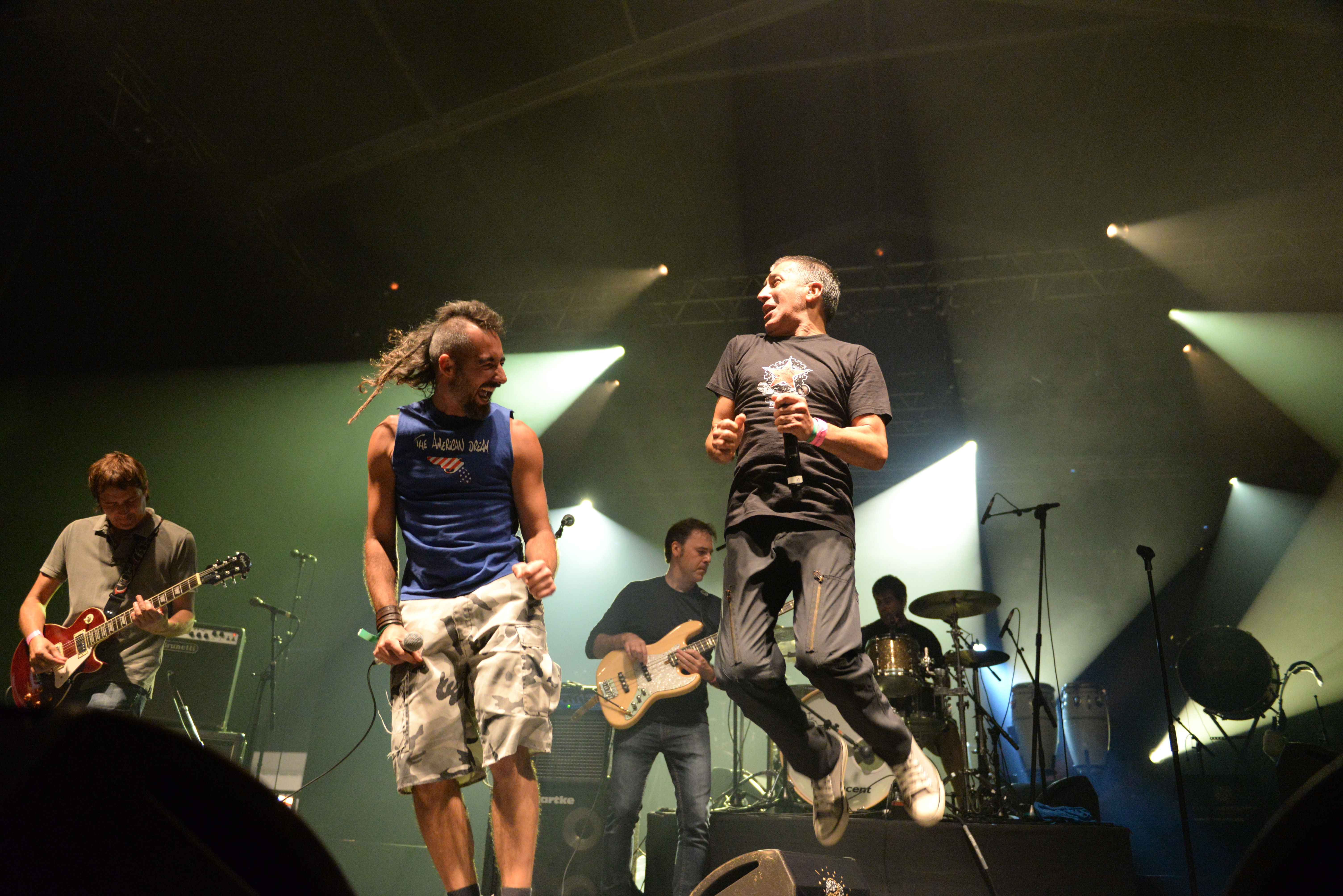 Concert de Dixebra du 8 août 2014 au Festival Interceltique de Lorient 2014